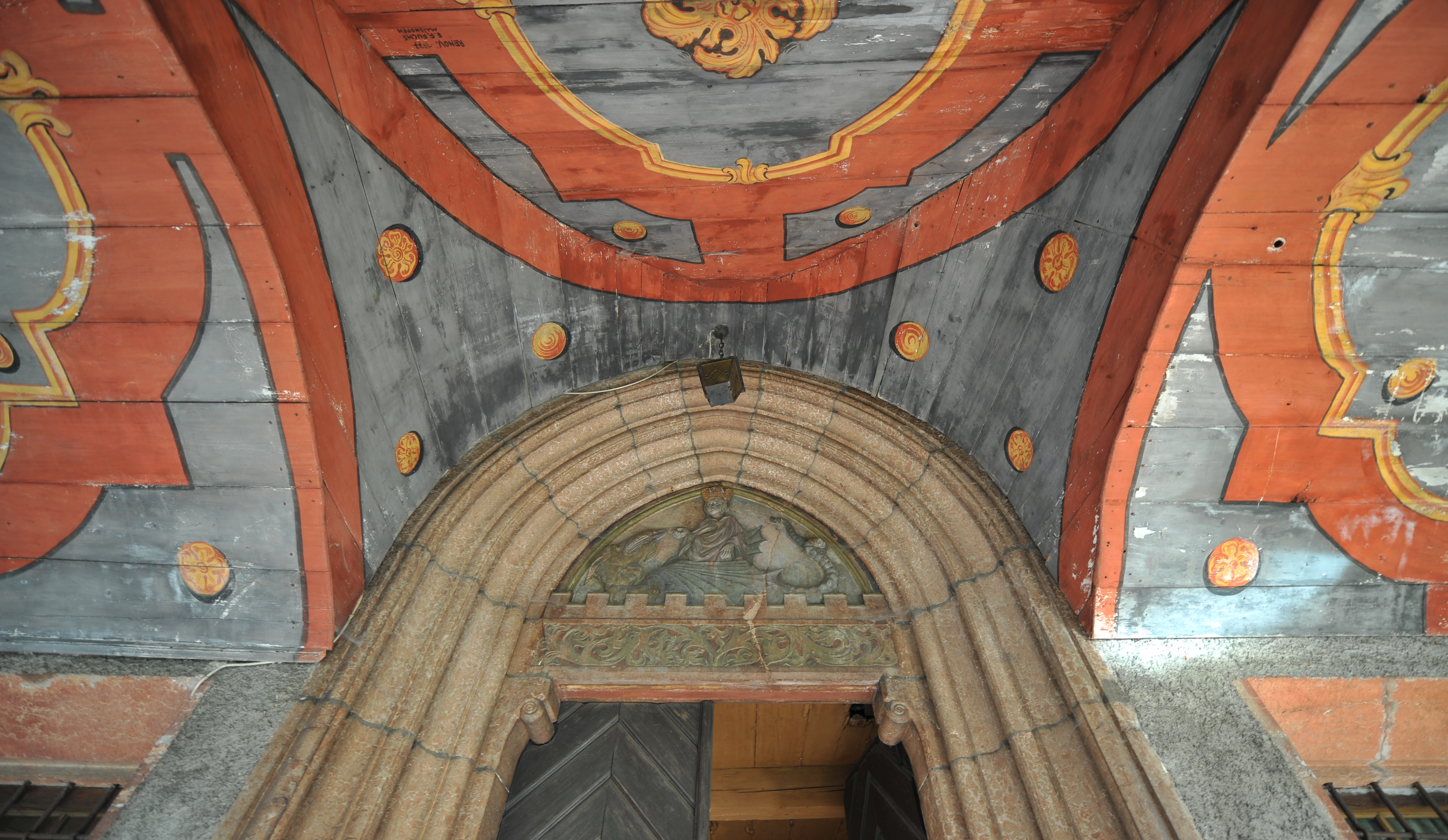 Kath. Filialkirche hl. Margaretha